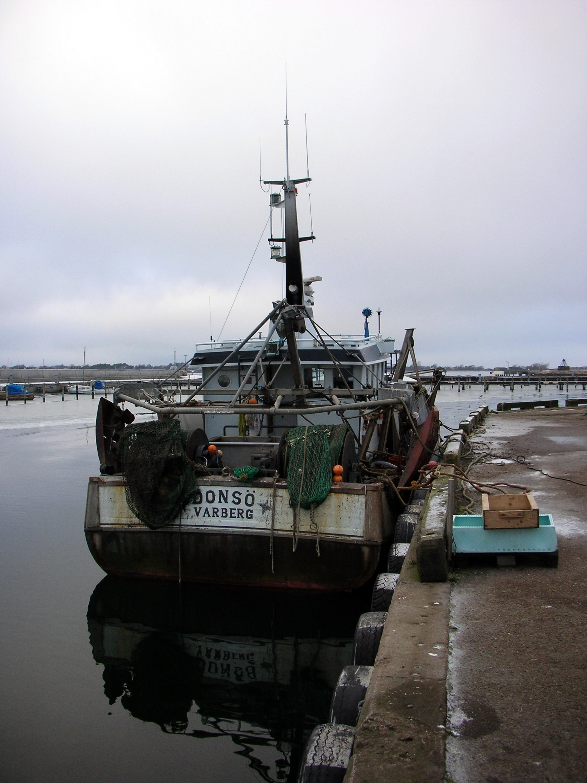 Fiskebåten Donsö (VG 164) i Varbergs hamn.